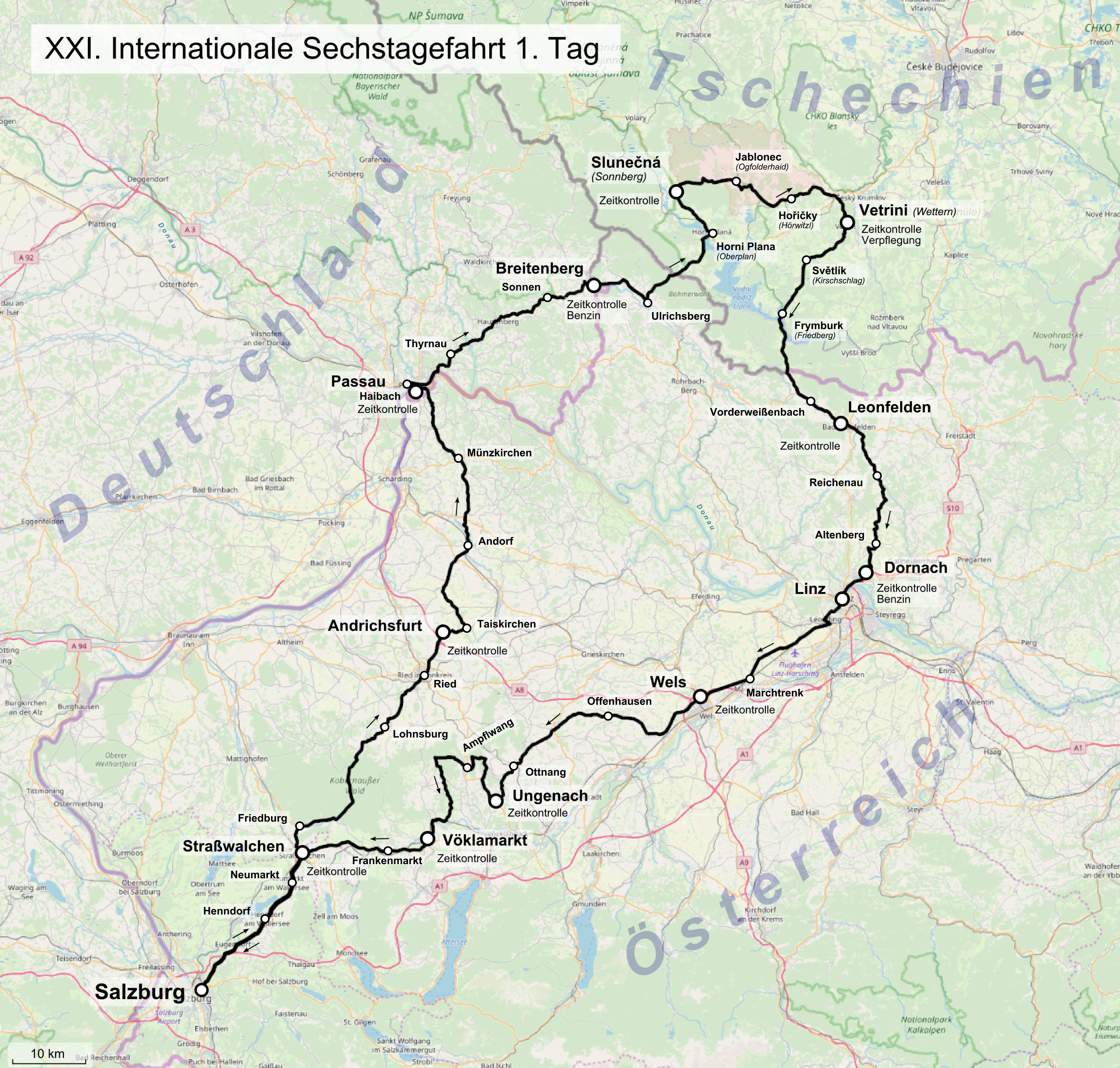 Karte der 21. Internationale Sechstagefahrt, Route des 1. Tages